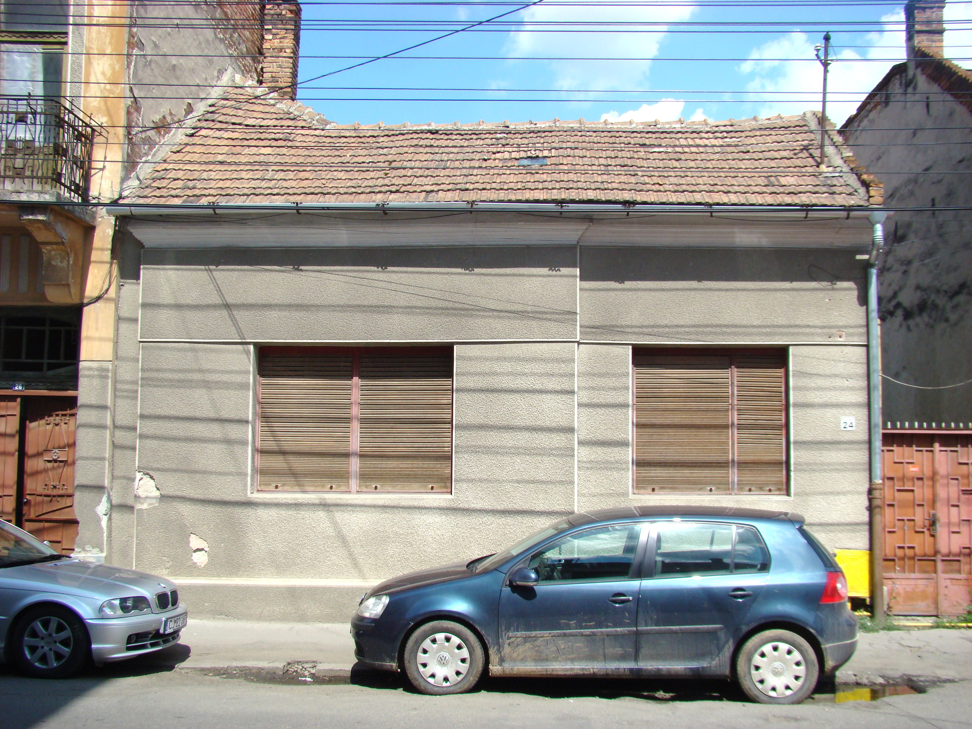 Clădire monument istoric, str. Craiovei, nr.24 (Sediul Sindicatelor C. F. R. în perioada interbelică)